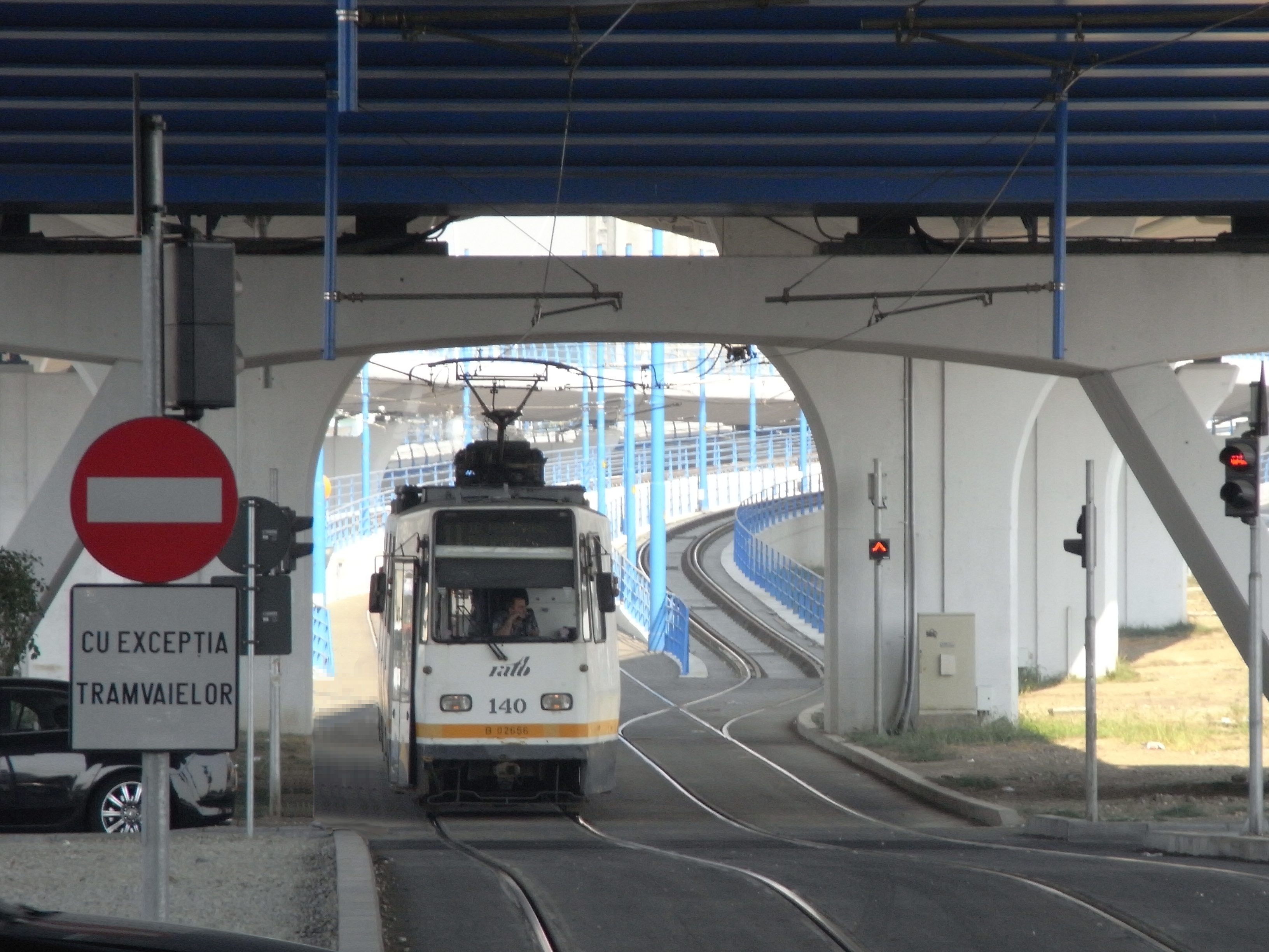 Bukarest, Straßenbahn unter dem Pasaj Basarab.